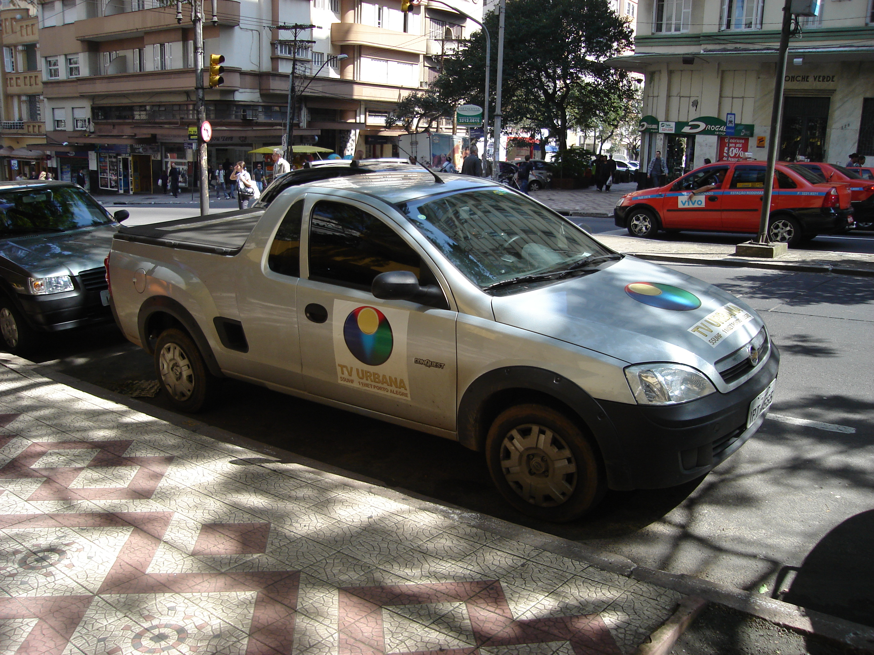 Carro da TV Urbana estacionado na avenida Borges de Medeiros, em Porto Alegre.